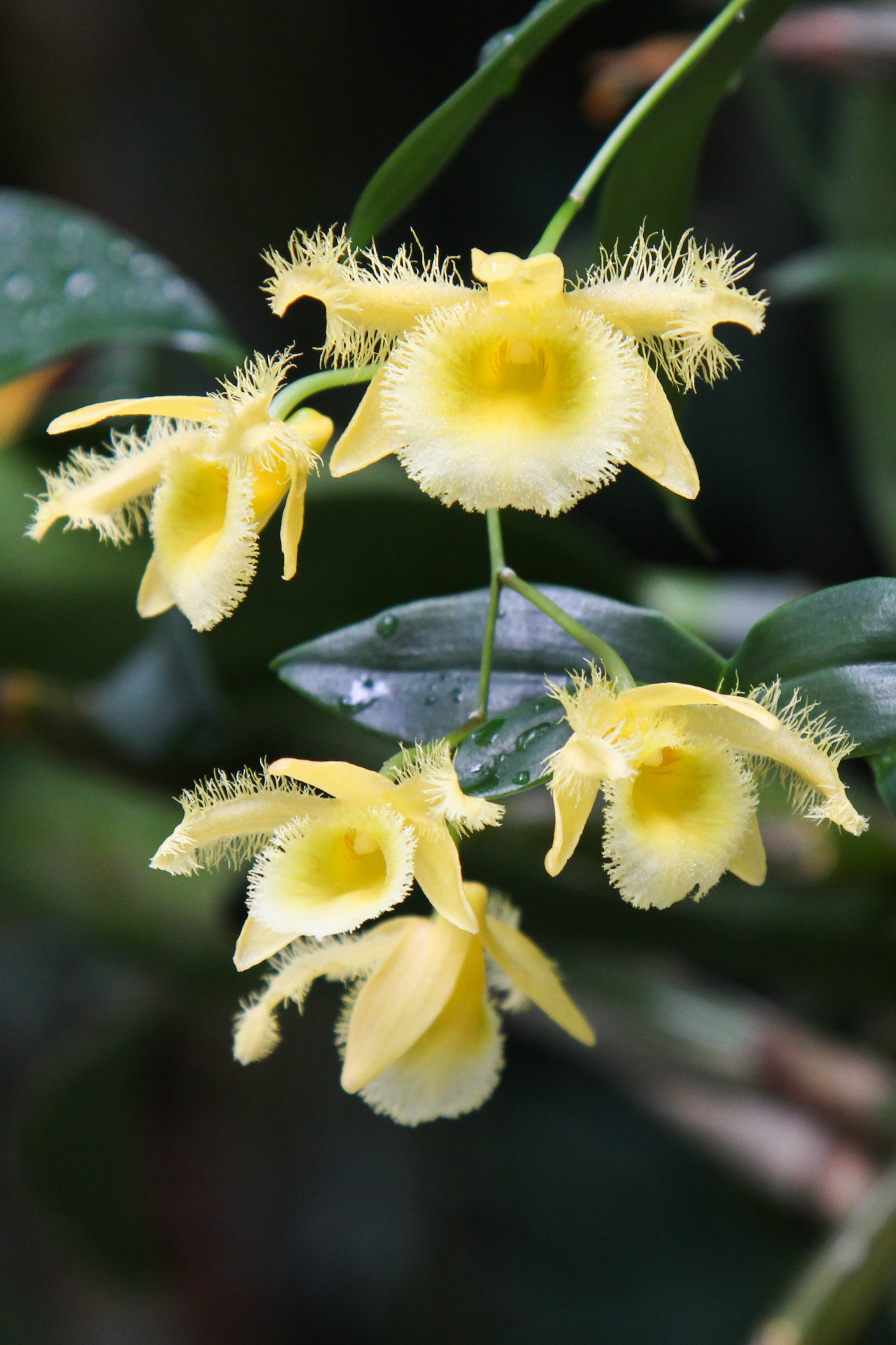 Dendrobium harveyanum